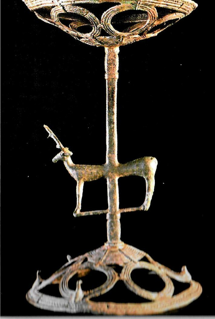 thymiaterion